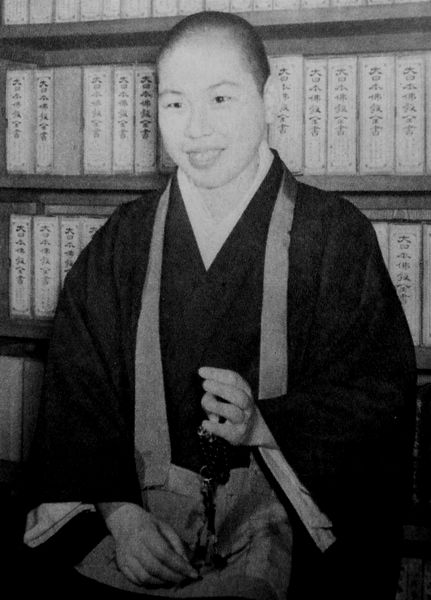 鷹司誓玉